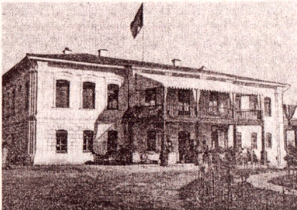 Будинок Башкірцевих у Гавронцях. Диканський район, Полтавська область, Україна The house Bashkirtseff in Havrontsi. Dykanka district, Poltava region, Ukraine